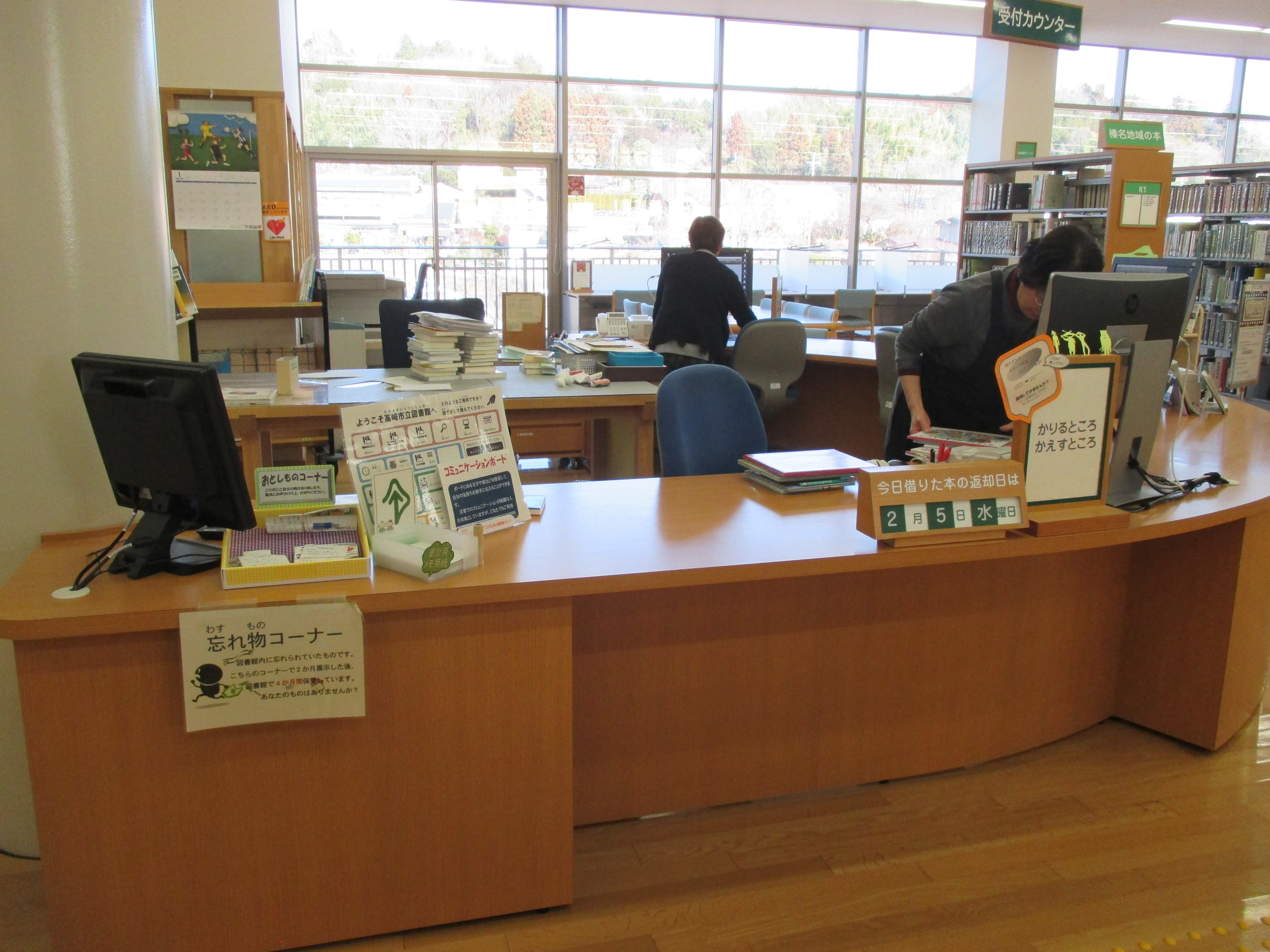 榛名図書館内部カウンター